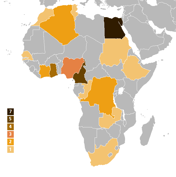 Mapa de Campeones de la CAF a fecha de 2017